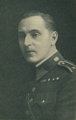 Akademický malíř, grafik, autor ex-libris - Emanuel Prüll (někdy uváděn též jako Emanuel Pryl) (* 27. října 1896 v Praze – 28. února 1980 v Praze). Portrétní foto v uniformě datované nejspíše před rok 1947.